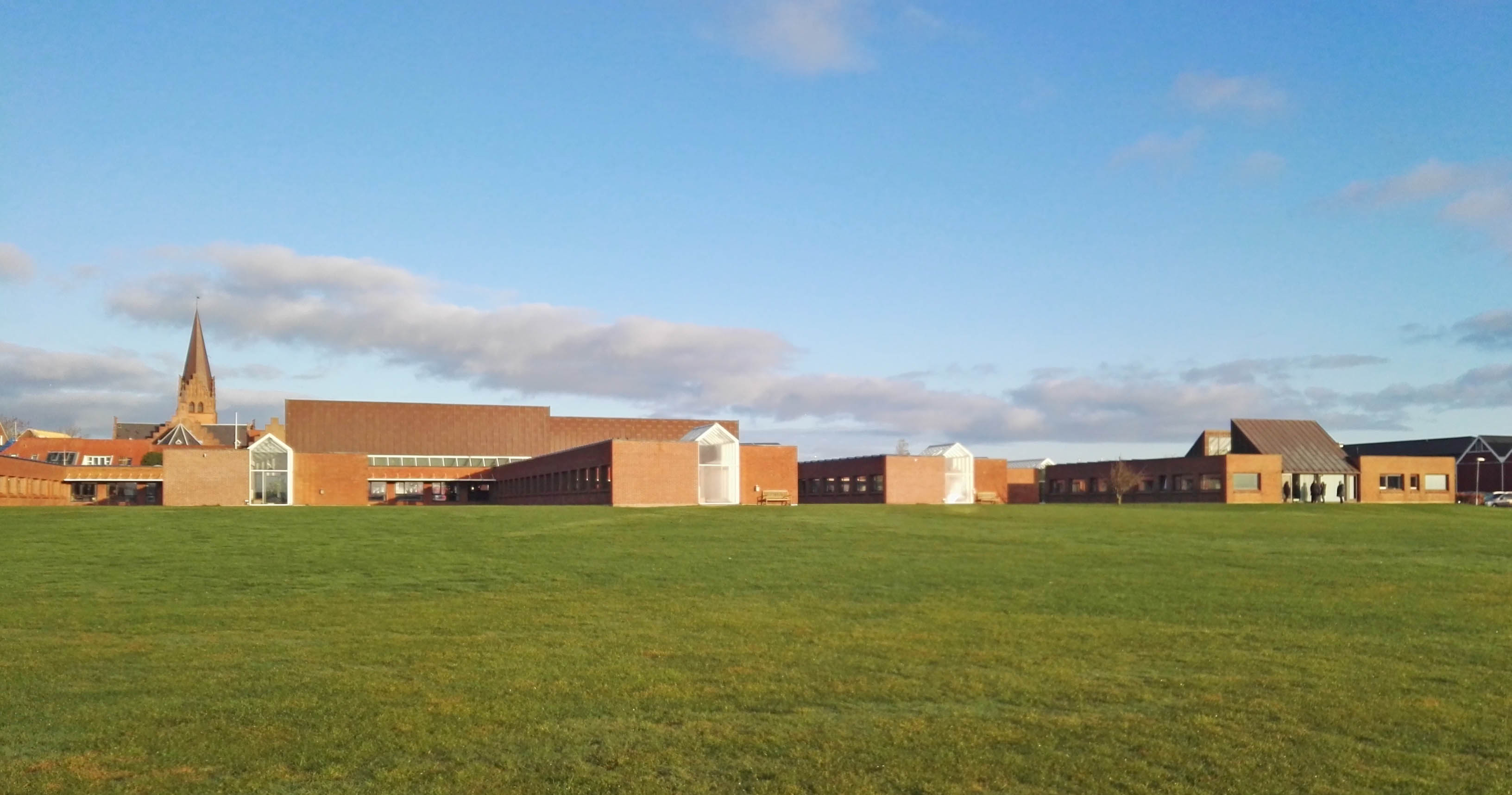 Morsø Kommunes rådhus på Jernbanevej 7 i Nykøbing Mors